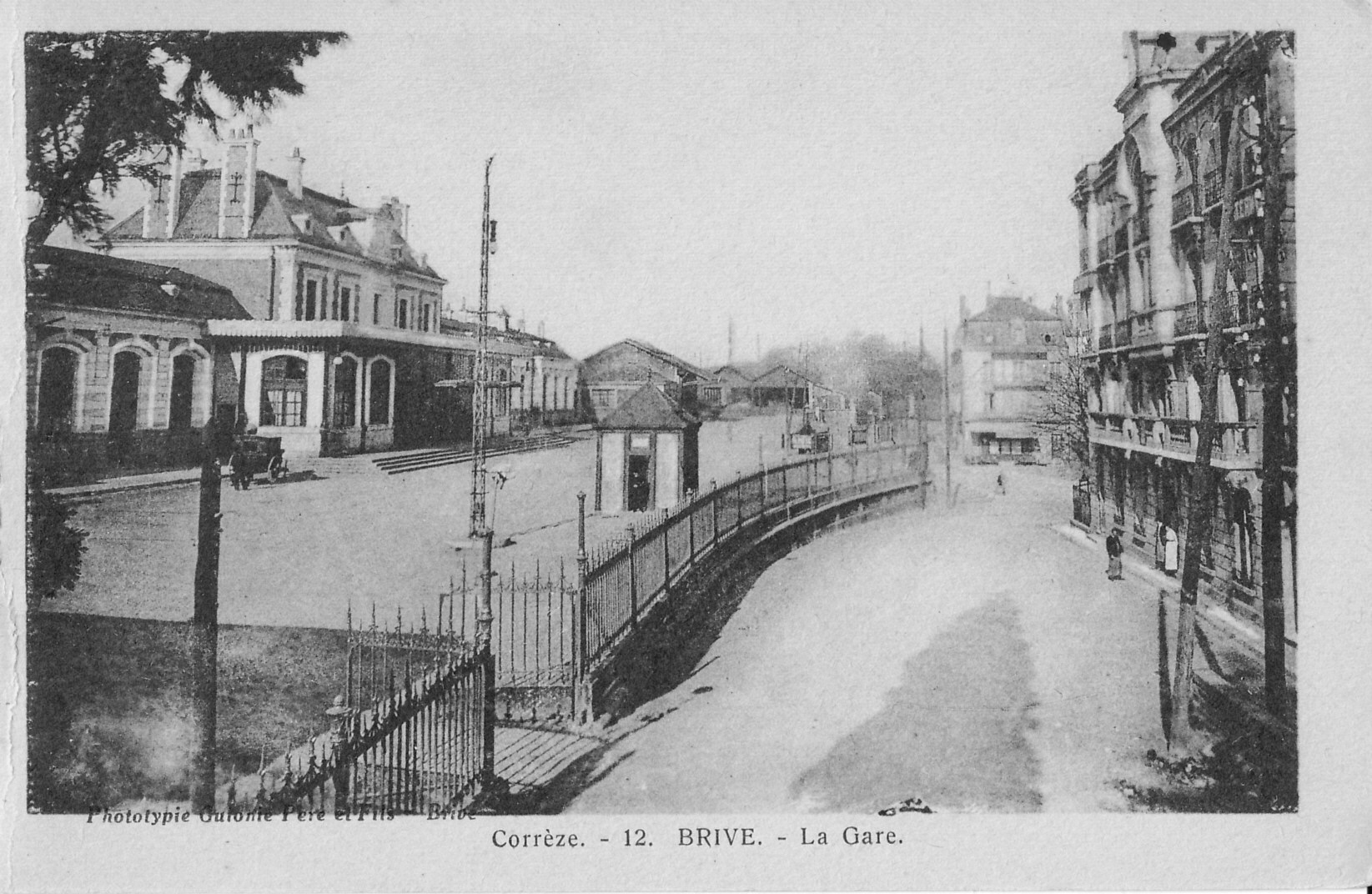 Carte postale ancienne éditée par phototypie Gironie Père et Fils, n°12 : BRIVE - La Gare